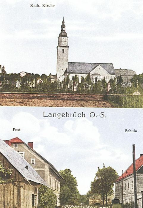 Widoczne na pocztówce dwa fragmenty wsi zwanej wówczas Langebrück. Gotycko-renesansowy kościół pod wezwaniem podwyższenia krzyża, którego budowę ukończono w 1604 r. (został zniszczony w czasie działań wojennych w 1945 roku) oraz fragment głównej ulicy wsi ze szkołą i pocztą